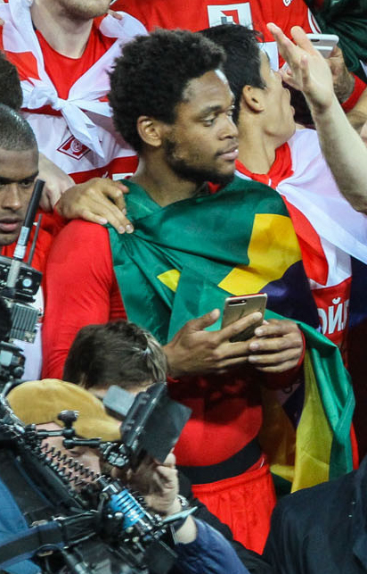 «Спартак» - «Терек»